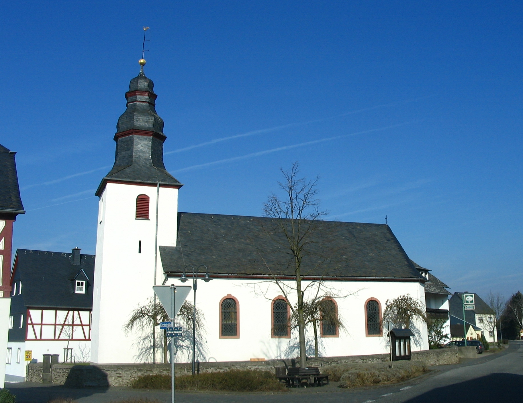 Alstrimmig im Hunsrück